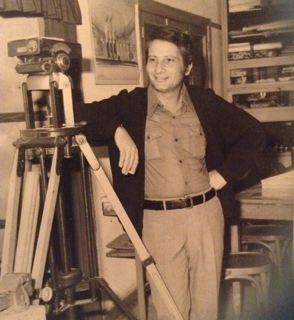 حسام مهيب مصور